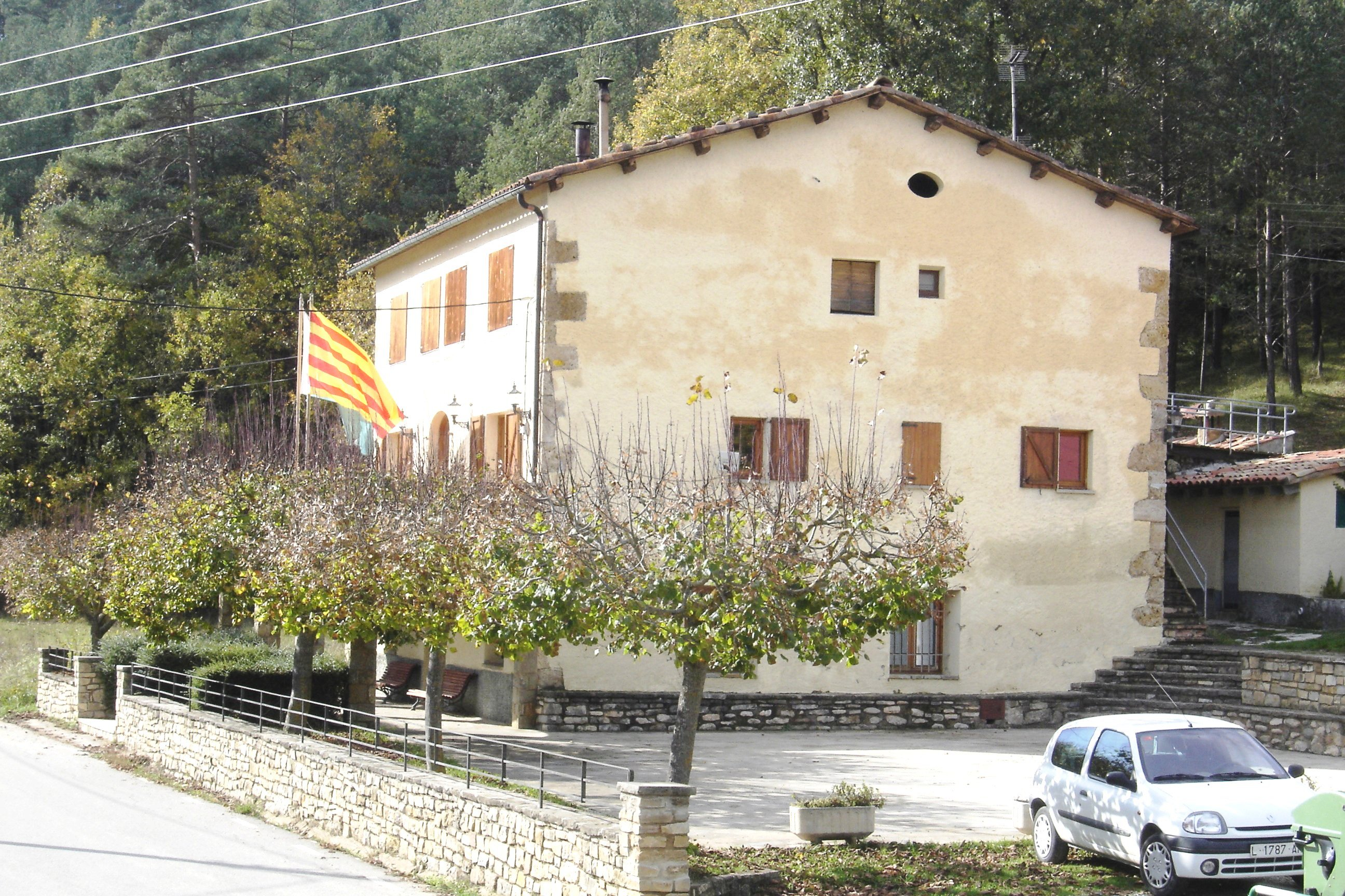 L'ajuntament de Guixers (Solsonès) a la Casa Nova de Valls.